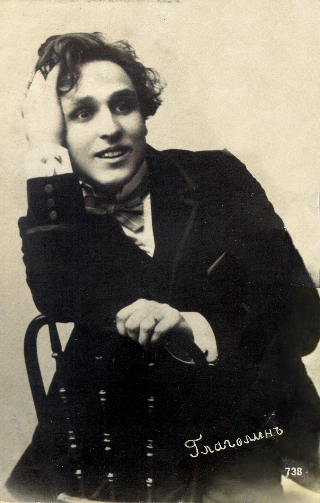 Копия открытки "Б. С. Глаголин" (Россия)